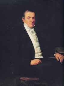 Portrait of Cristóbal Mendoza.